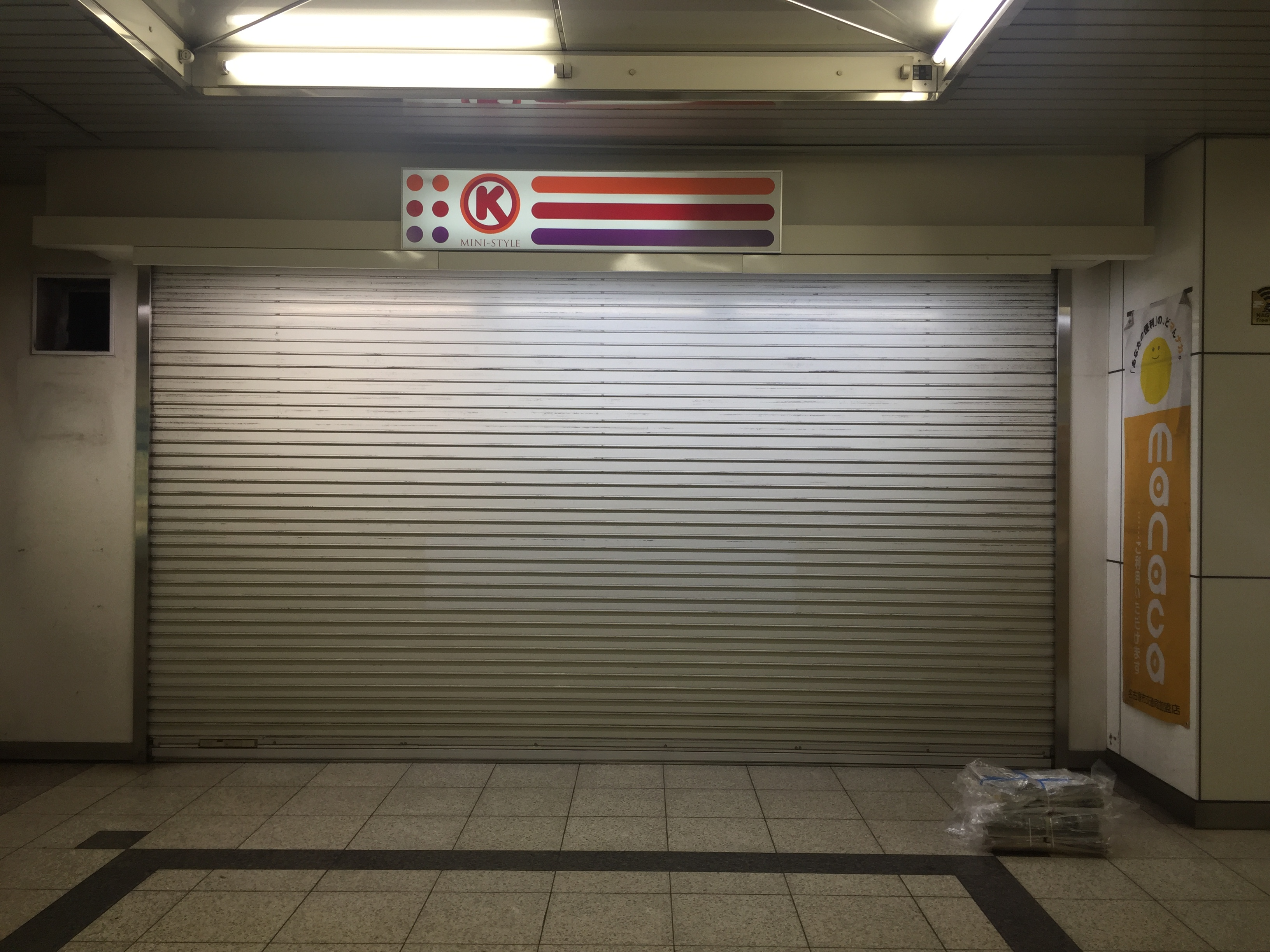 konbini newspaper